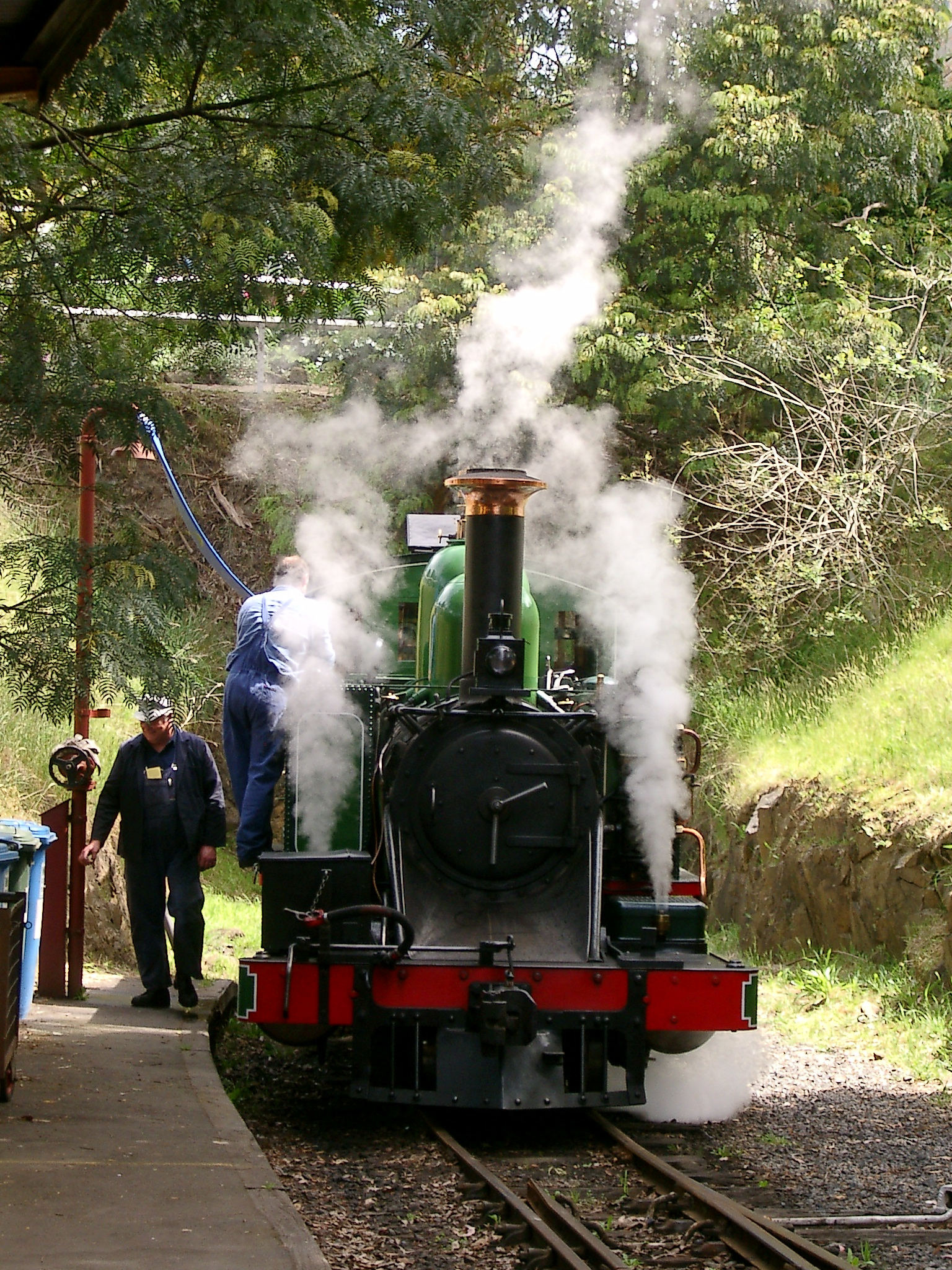 Foto: Lok 6A der Puffing Billy Railway beim Wassernehmen Eigenes Foto vom 10.11.2002